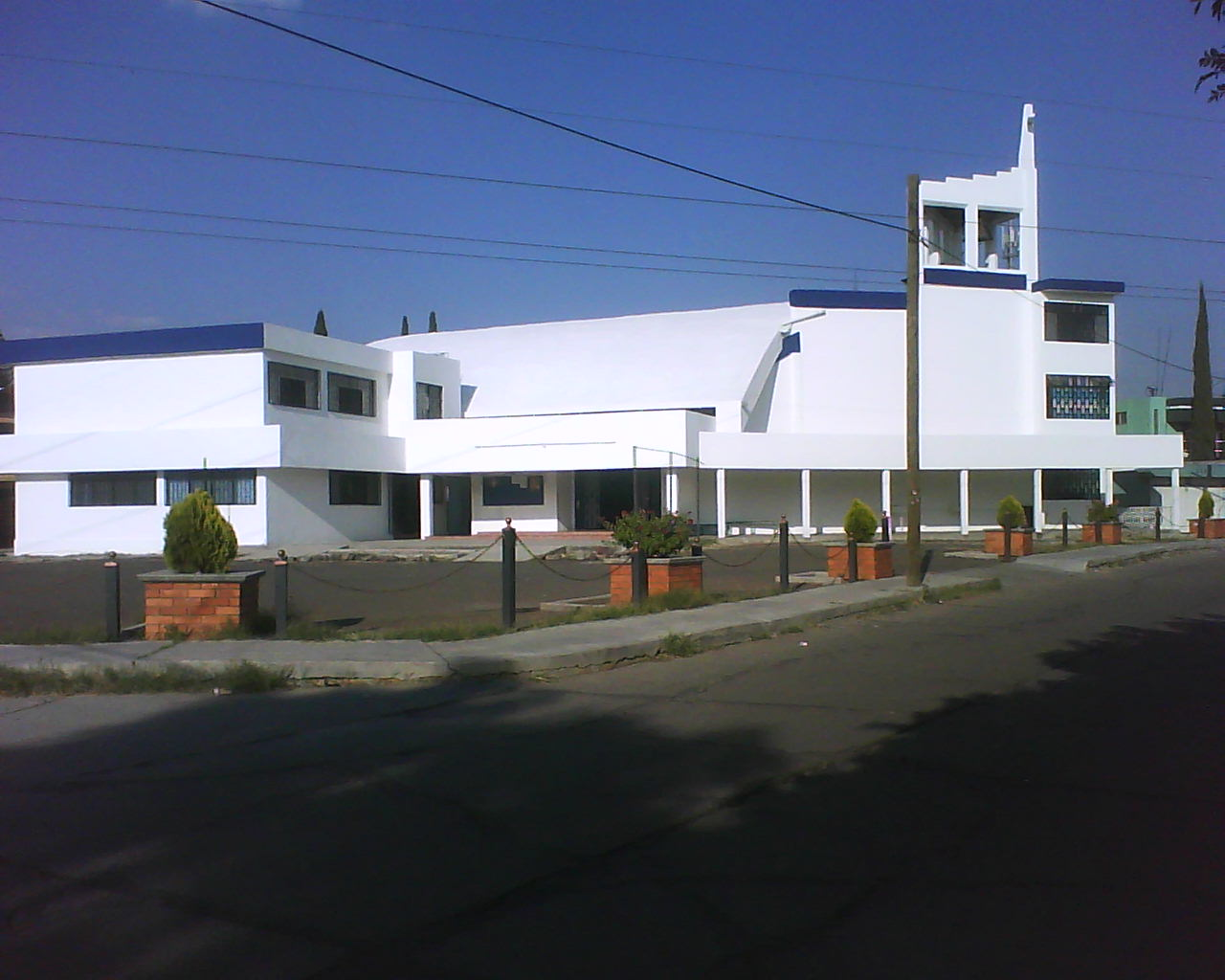 Toma fotográfica de la Parroquia con su fachada actual